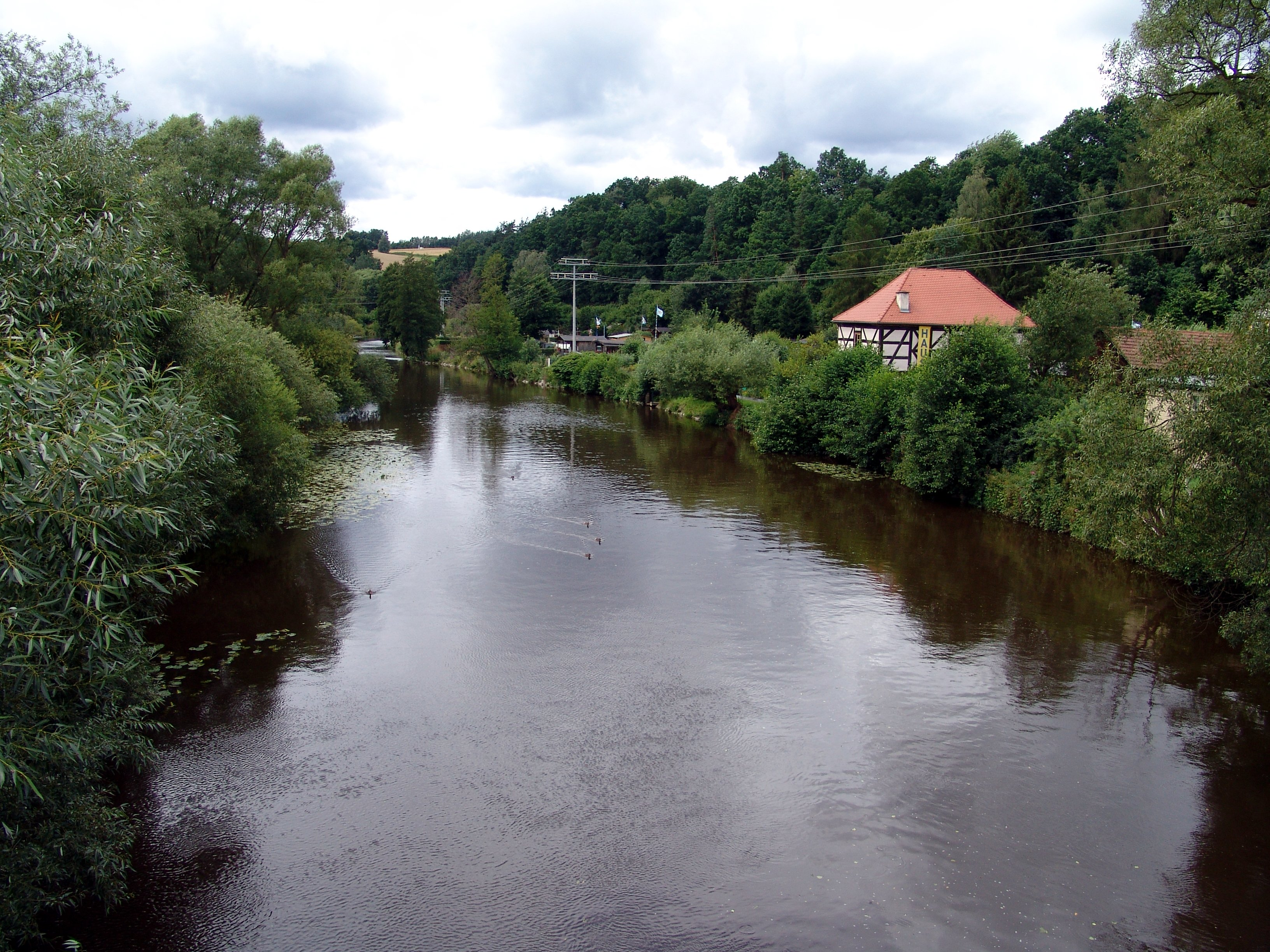 Neustadt a.d. Waldnaab - Deutschland/BY